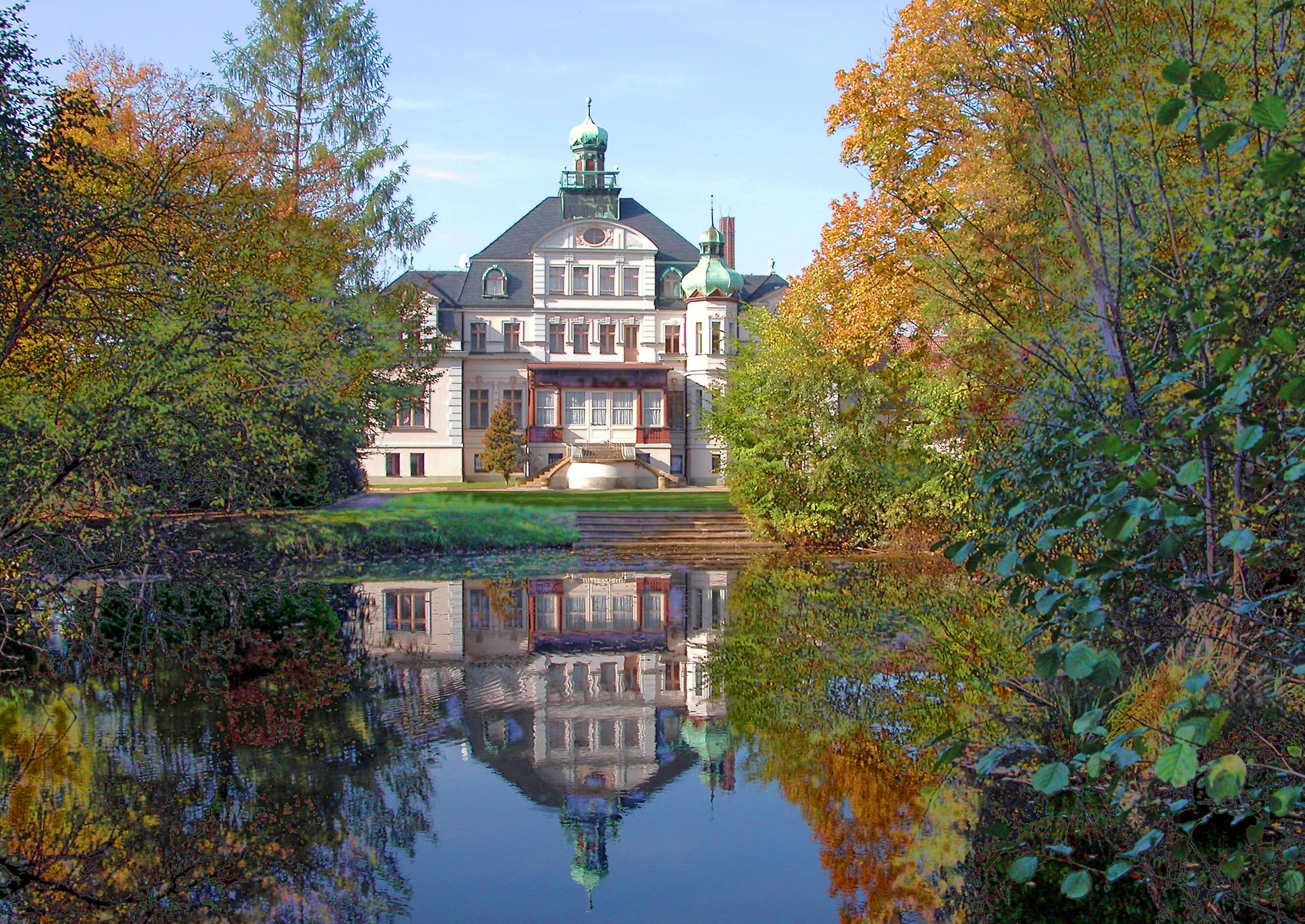 18.10.2006 04938 Uebigau (Uebigau-Wahrenbrück), Schloßstraße: Schloß, heute Jugendherberge "Schloßherberge" (GMP: 51.593976,13.302486). Das Rittergut ging aus der mittelalterlichen Burg der Herren von Ileburg hervor. Um 1868 wurde unter dem Rittergutsbesitzer Paul Beskow ein eingeschossiger Putzbau mit einem an der Parkseite angesetzten Turm errichtet. Nach 1892 erhielt das Schloß unter Georg Bock von Wülfingen seine heutige Gestalt, nur der Mitteltrakt wurde 1904 noch aufgestockt. Nach der Enteignung richtete man im Schloß die noch heute bestehende Jugendherberge ein. Sicht vom Park von Südosten. [DSCN12161.TIF]20061018300DR.JPG(c)Blobelt